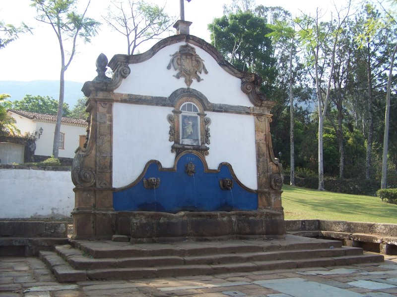 Chafariz São José, Tiradentes - MG, Brasil.